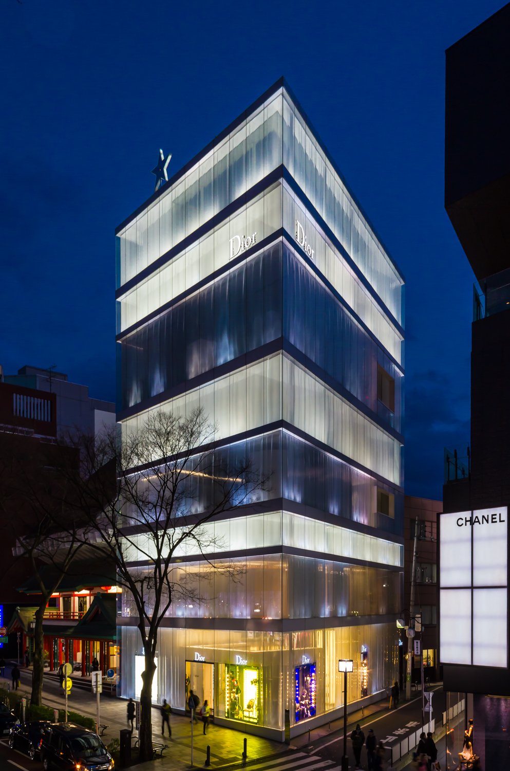 クリスチャン・ディオール表参道（SANAA設計）